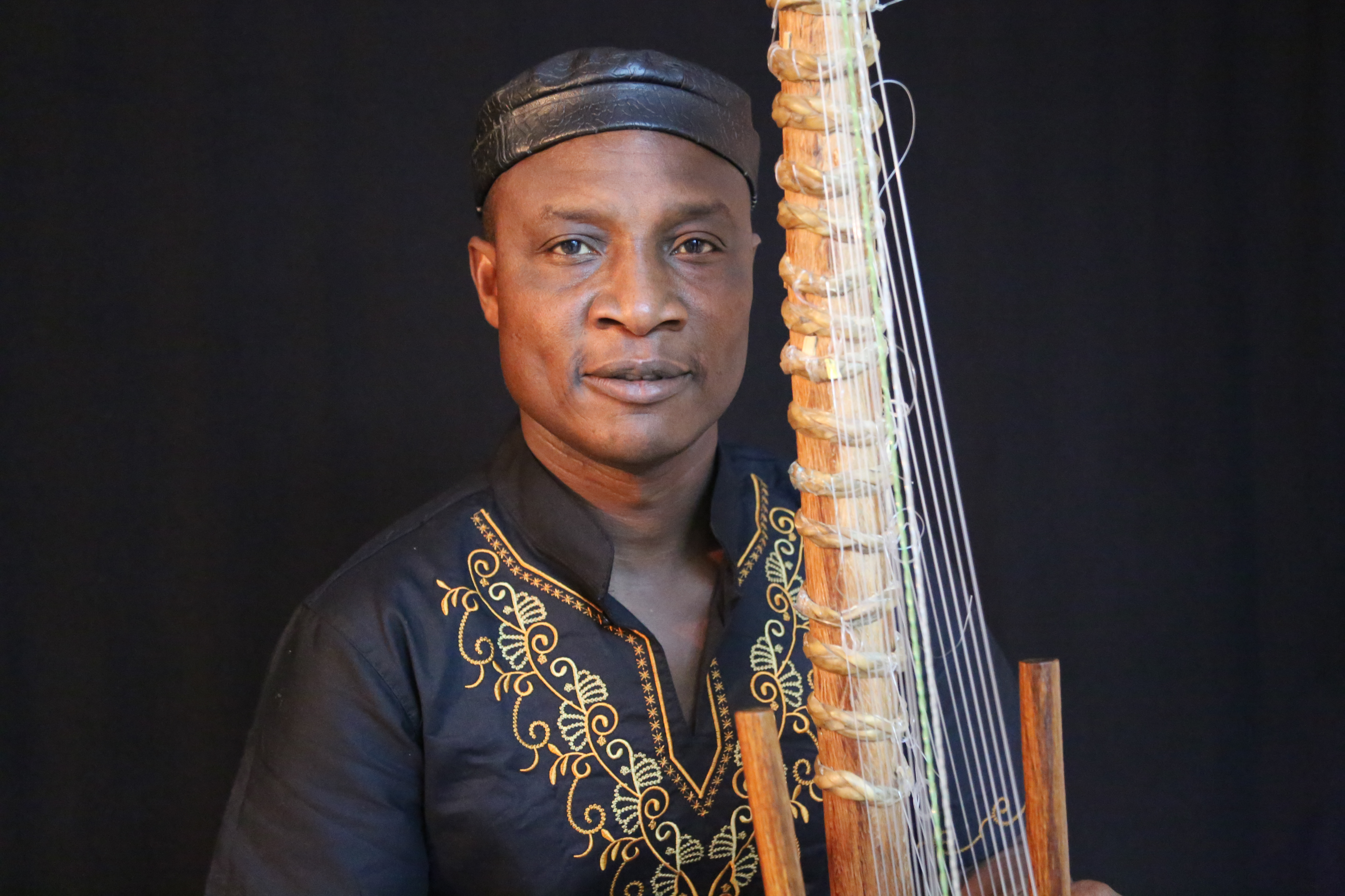 Adjiri Odametey mit der Kora (Afrikanische Harfe)